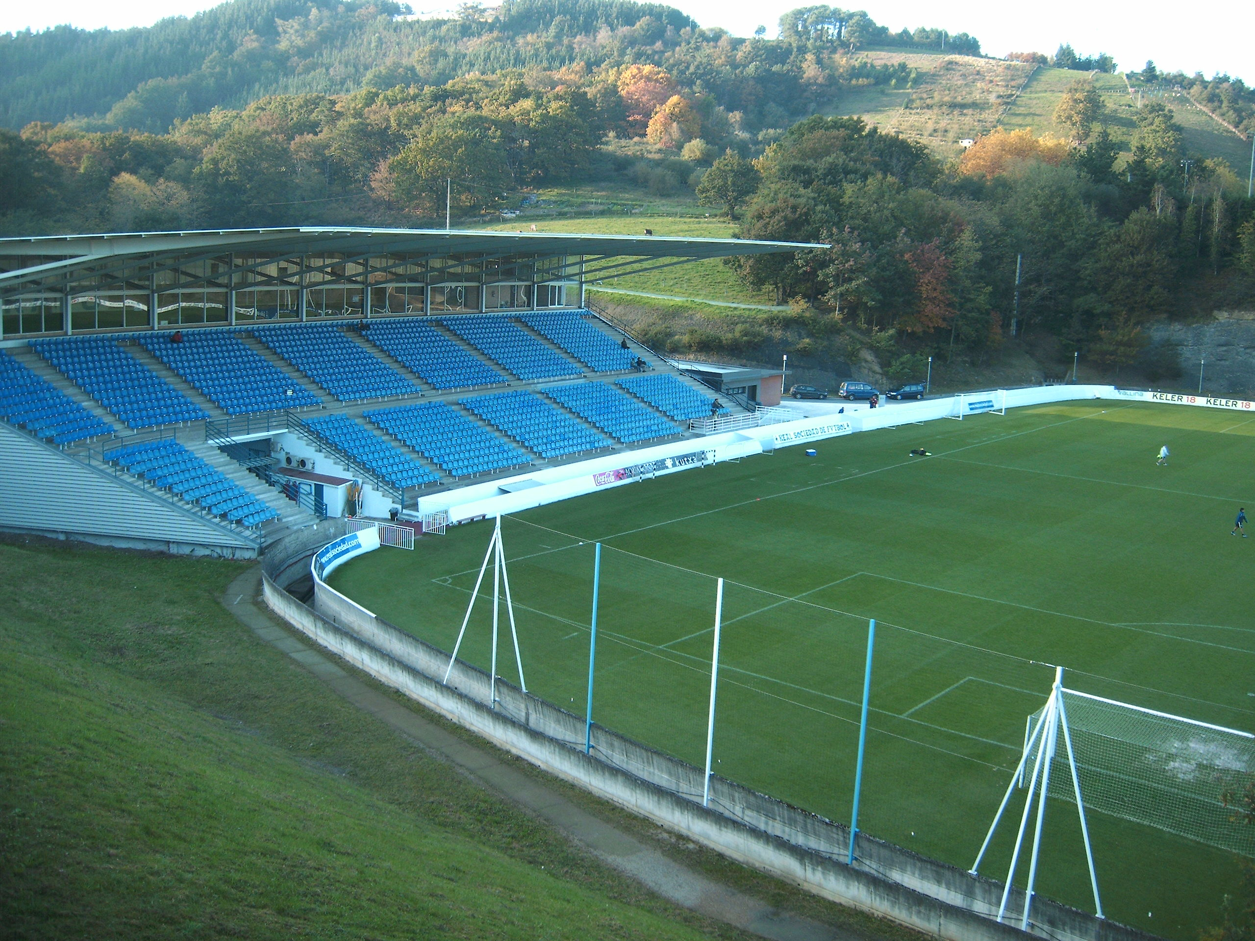 Foto del campo principal de las Instalaciones de Zubieta, llamado Jose Luis Orbegozo (Z1) publicada originalmente en